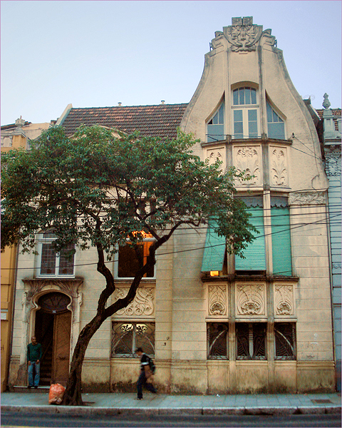 A Casa Godoy, Porto Alegre, Brasil, localizada no bairro Independência.